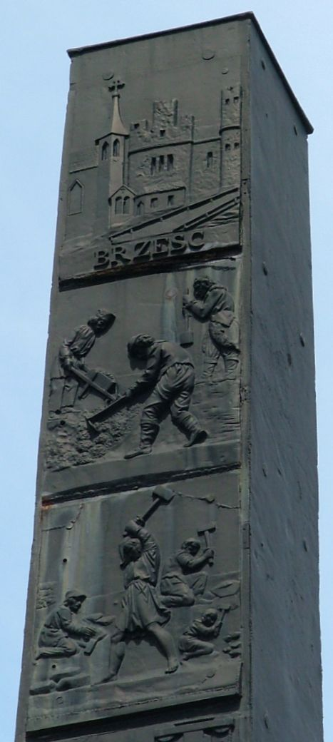 Poland, Warsaw, Pomnik Budowy Szosy Brzeskiej, ul. Grochowska